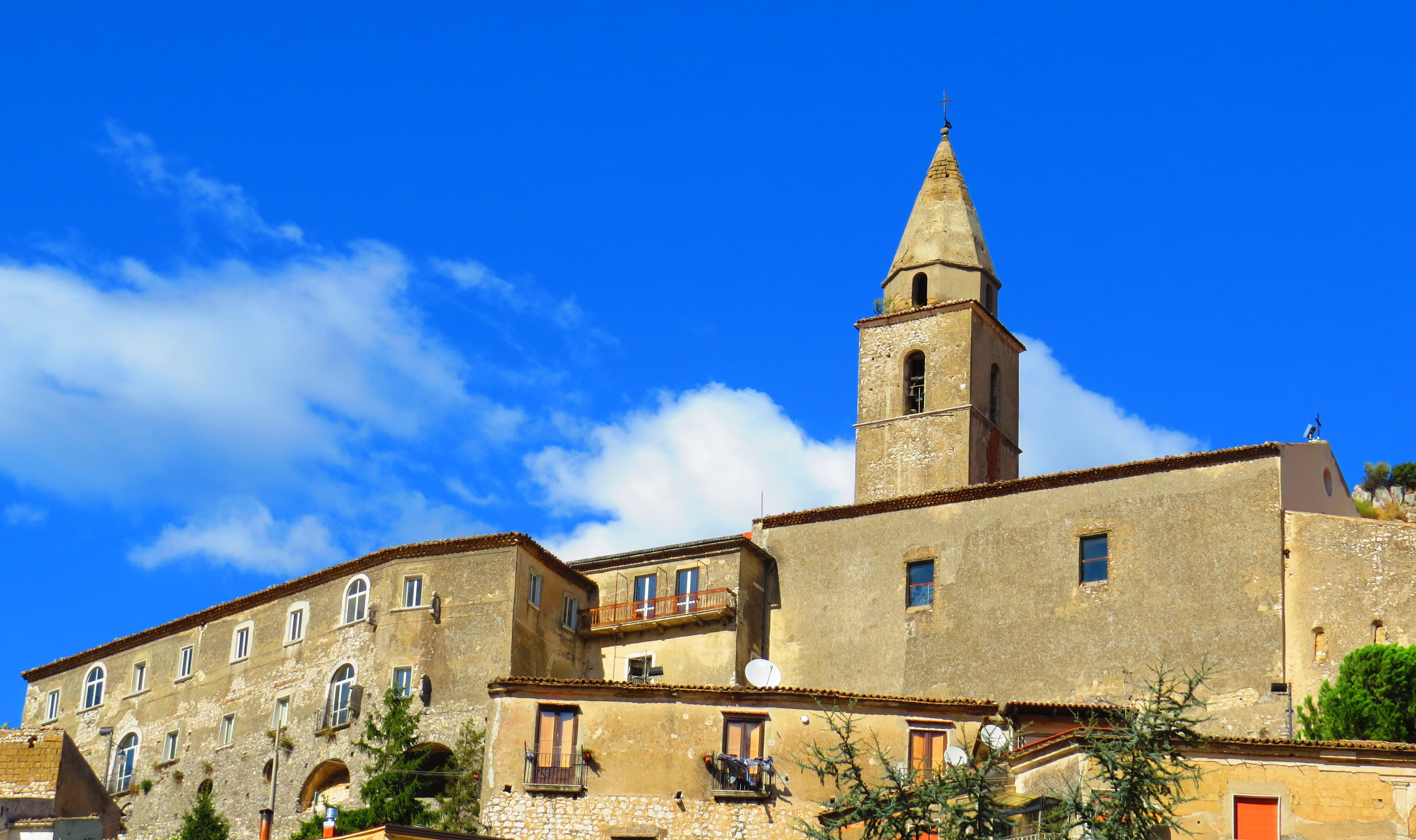 La chiesa della Madonna delle Grazie, annessa a un convento francescano nel centro storico di Montesarchio (BN)